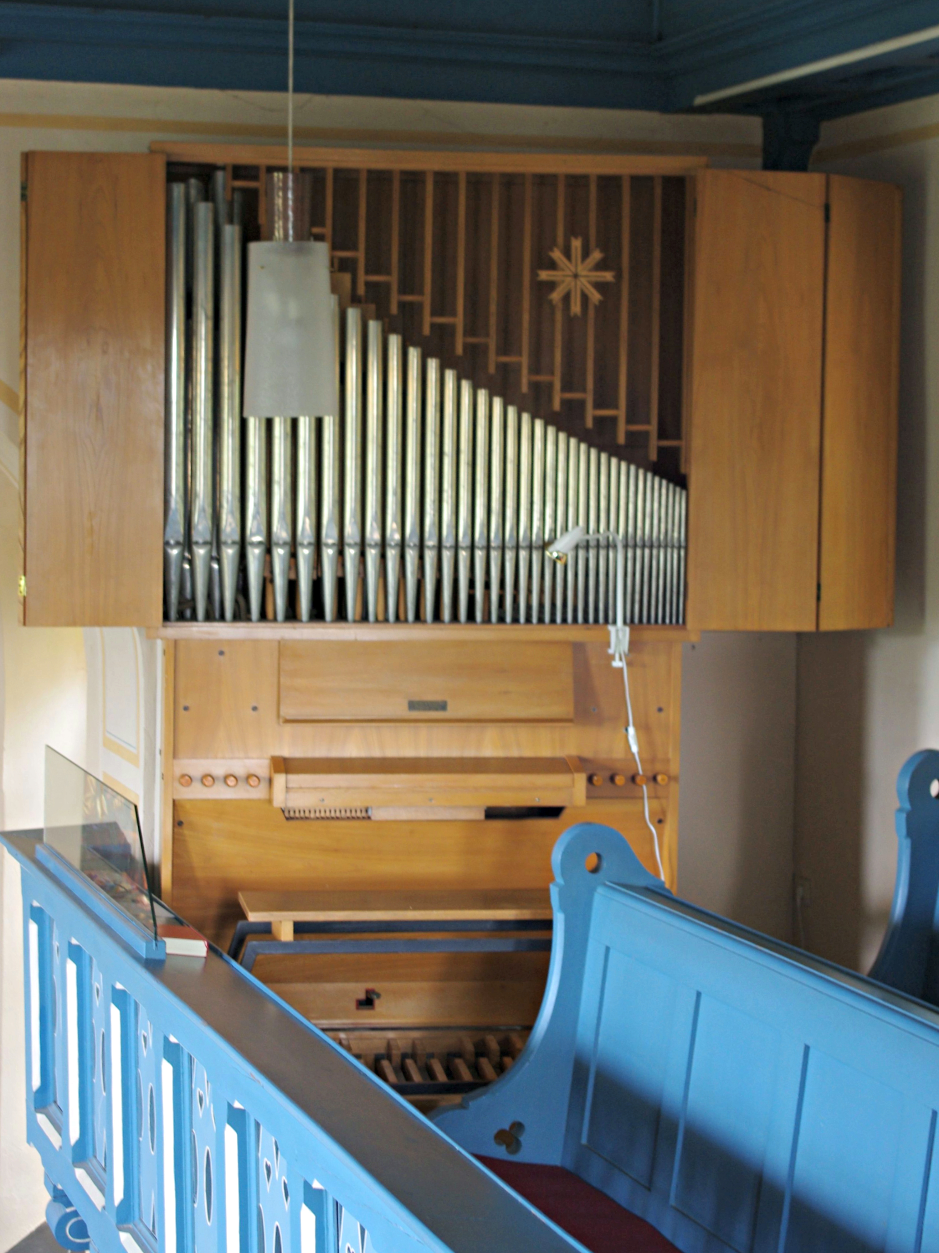 Orgel der ev.-luth. Kirche zu Allertshausen